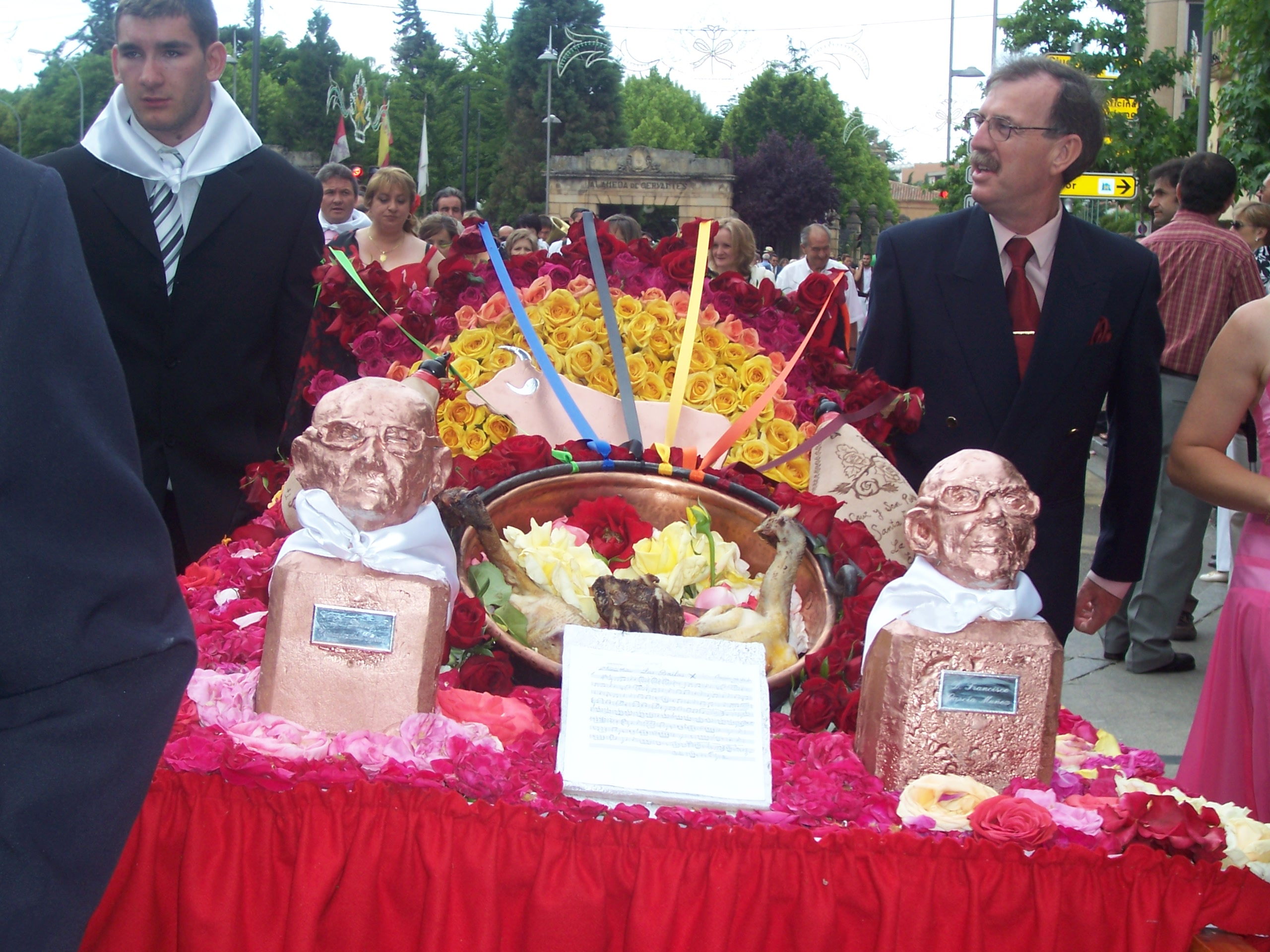 Domingo de Calderas (Soria)